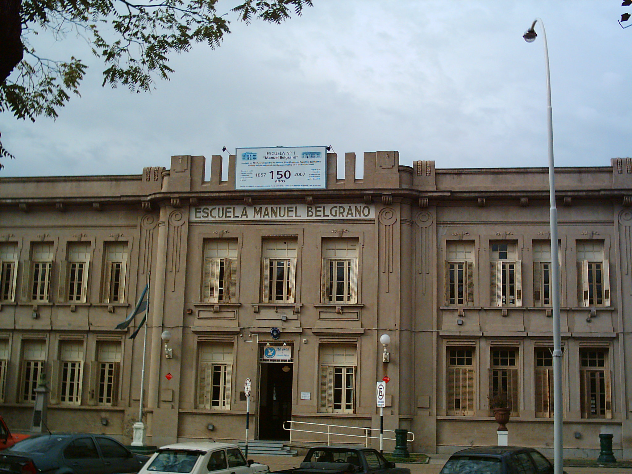 Escuela Nº1 de Tandil